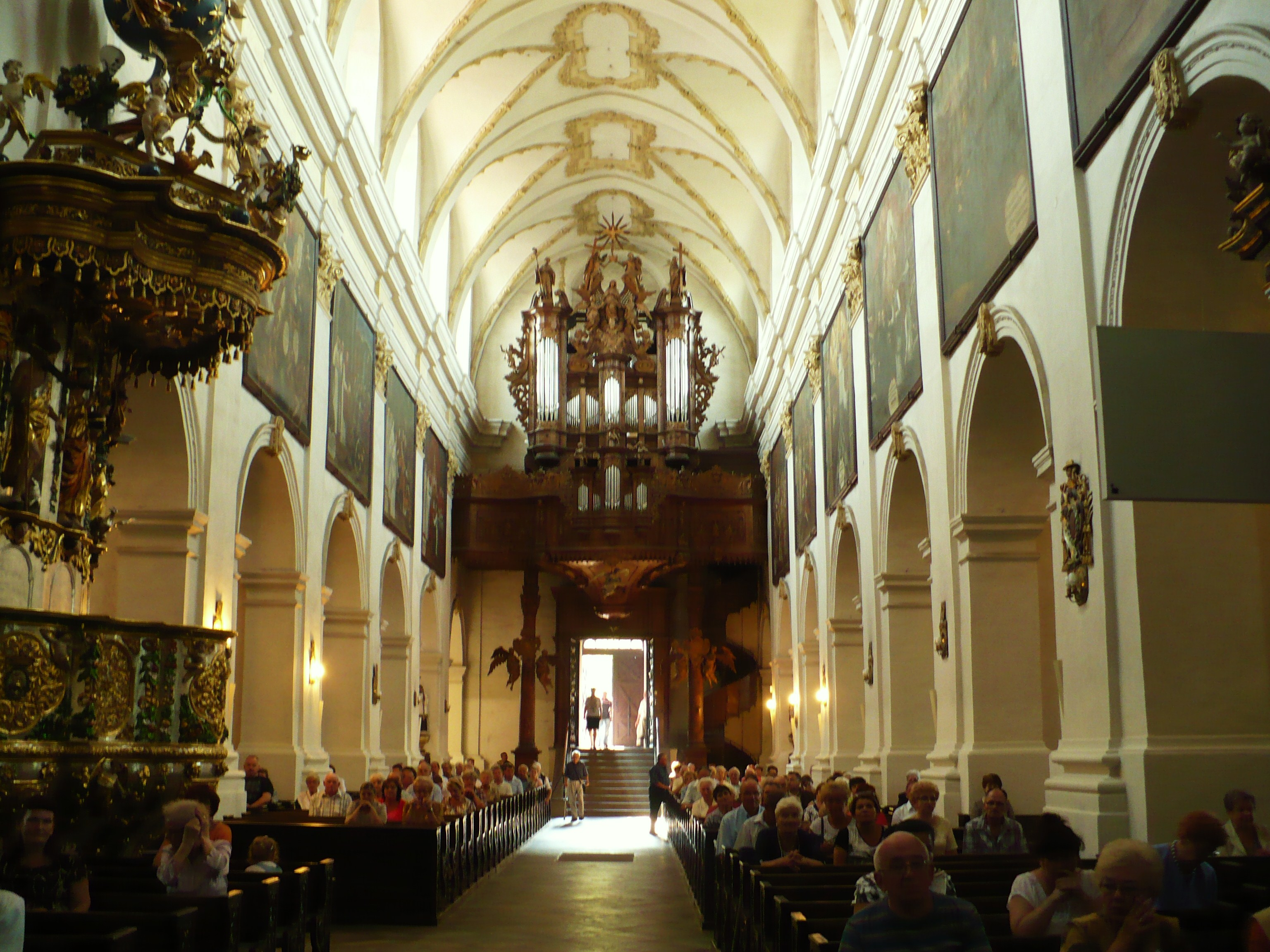 Koronowo, kościół klasztorny cystersów, ob. par. pw. Wniebowzięcia NMP, XIV, 1687